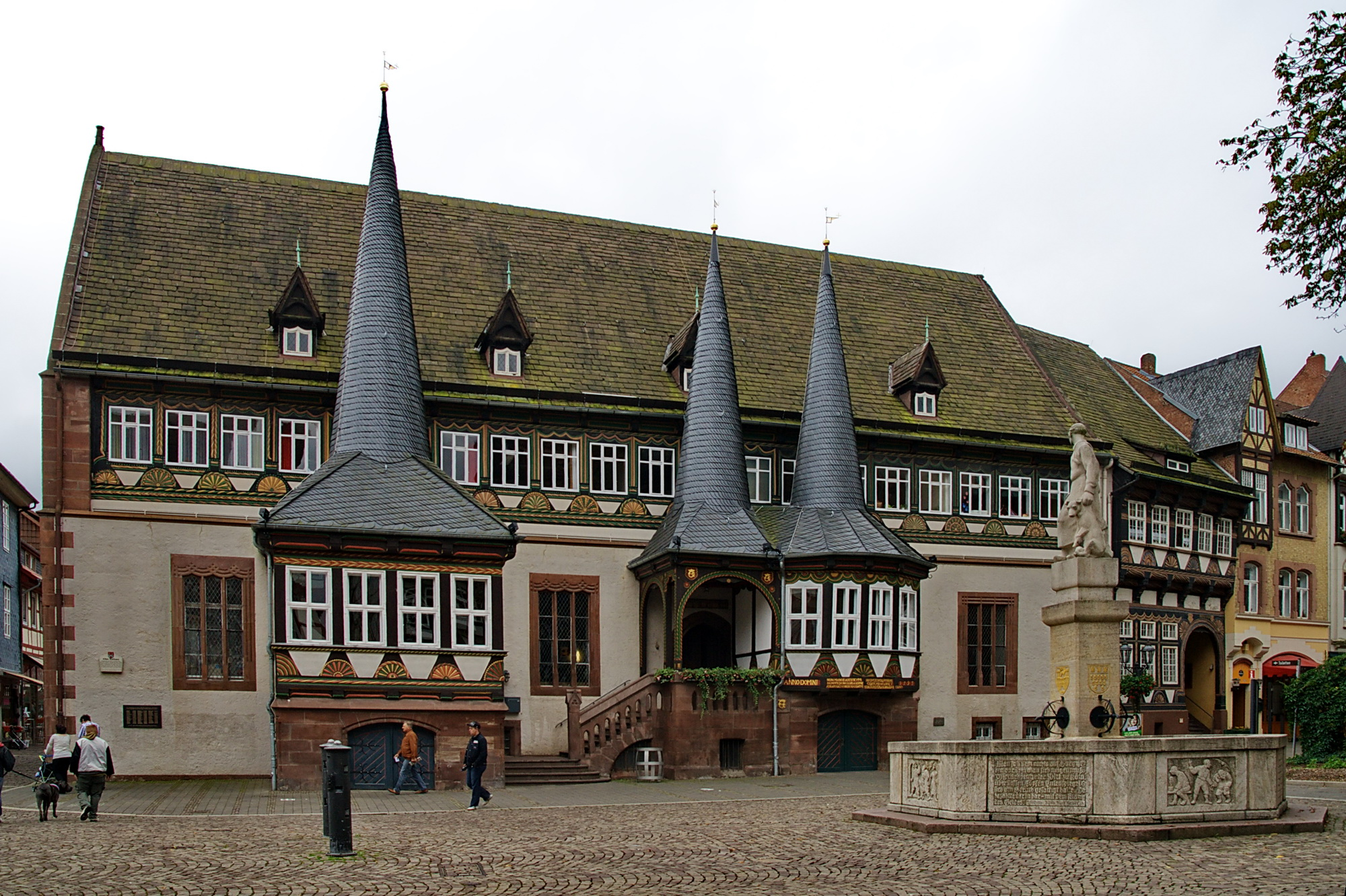 Altes Rathaus in Einbeck, Niedersachsen, Deutschland